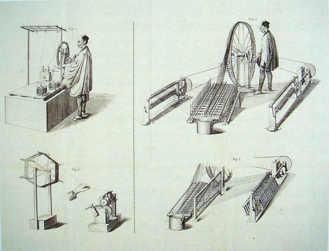 Illustration from La sericulture, le commerce des soies et des graines et l'industrie de la soie au Japon, 1874.